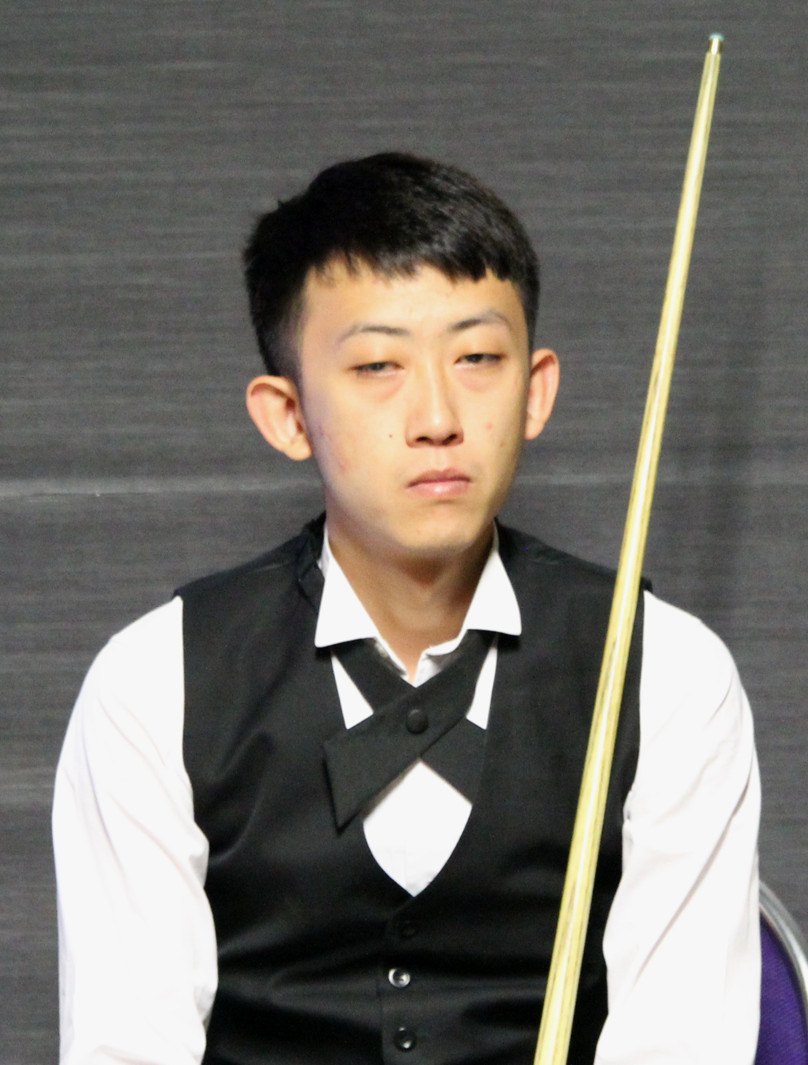 Chen Zhe beim Paul Hunter Classic 2016